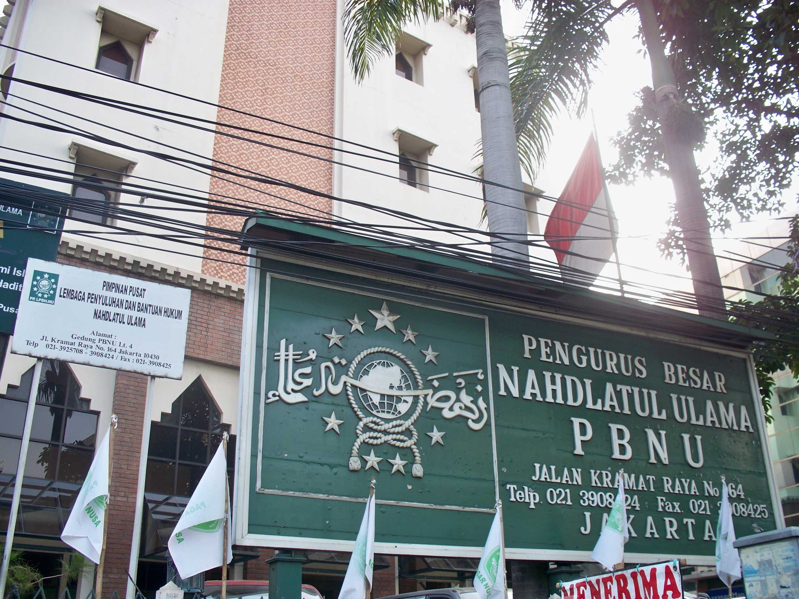 Pengurus Besar Nahdlatul Ulama